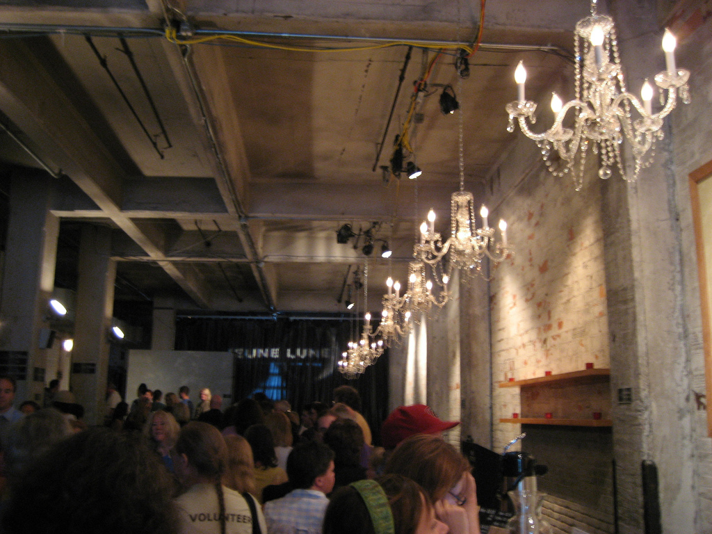 Theatre de la Jeune Lune, Minnesota Fringe Festival, Minneapolis, Minnesota